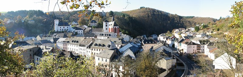 Stadt Neuerburg von Osten gesehen